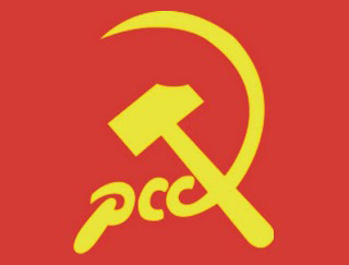 logo partido comunista